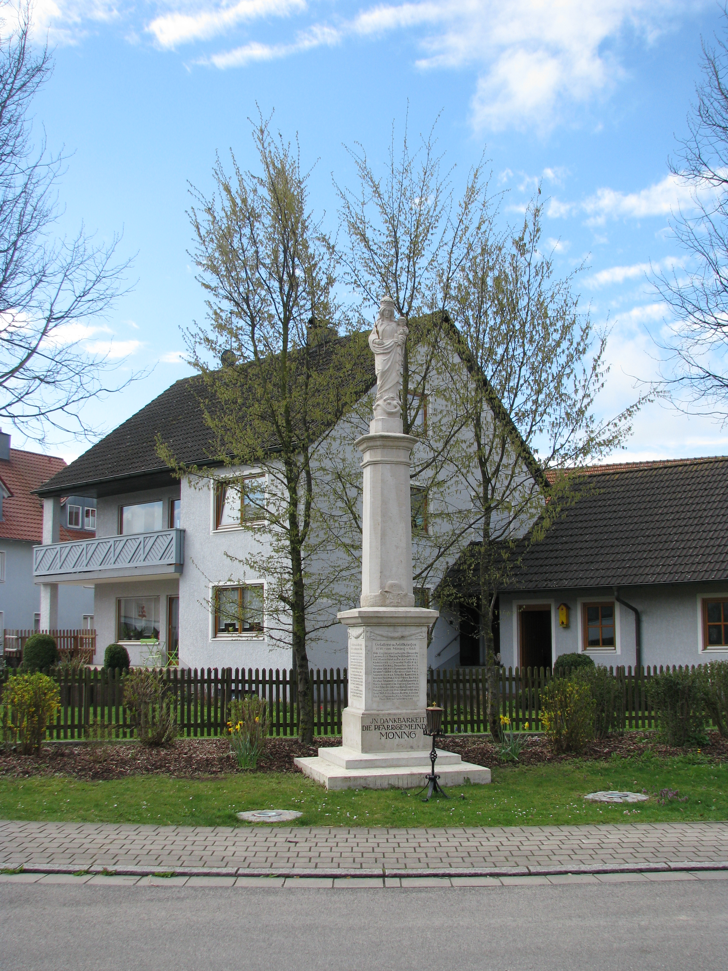 Möning, Ortsteil von Freystadt im Landkreis Neumarkt in der Oberpfalz, Kriegerdenkmal Mariensäule